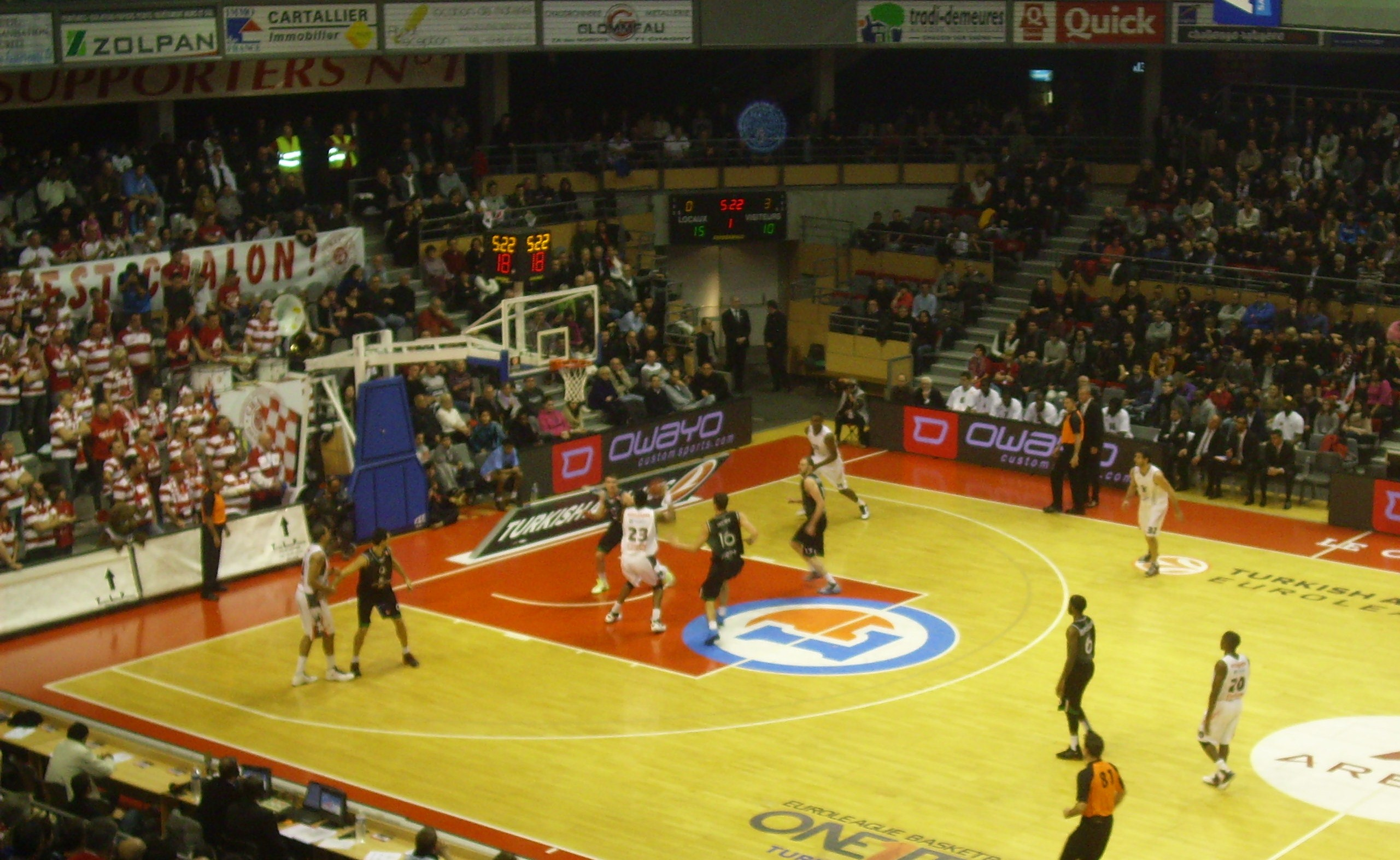 Match d'Euroligue 2012-2013 entre l'Elan Chalon et Sienne